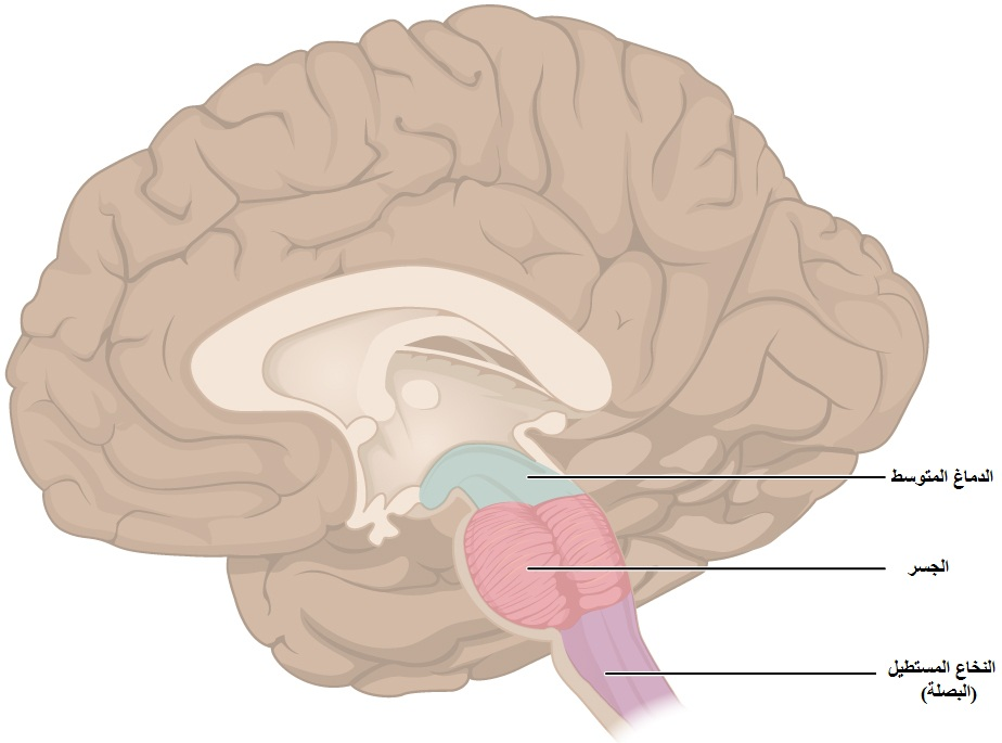 الأجزاء الثلاثة في جذع الدماغ ملونة بألوان مختلفة